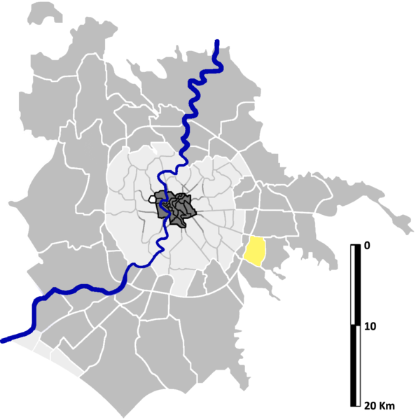 Torrenova